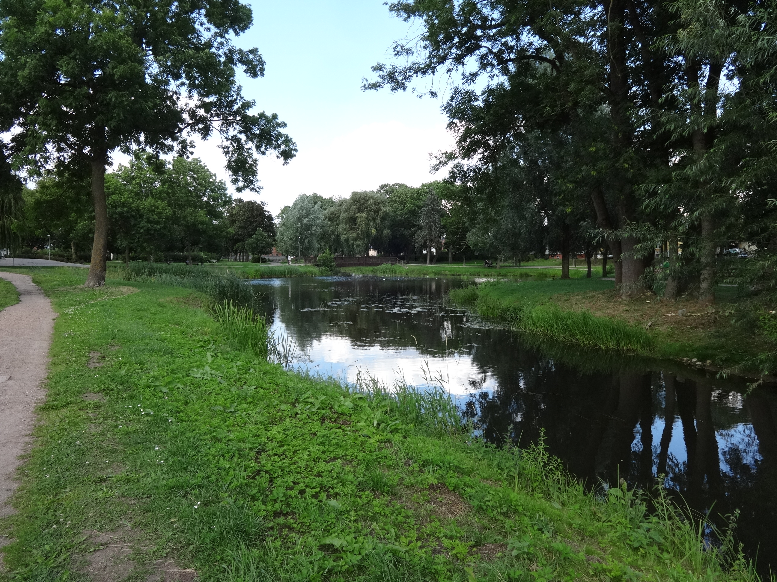 Volkspark an der Goethestraße in Malchin. Durch ihn verläuft die Ostpeene.